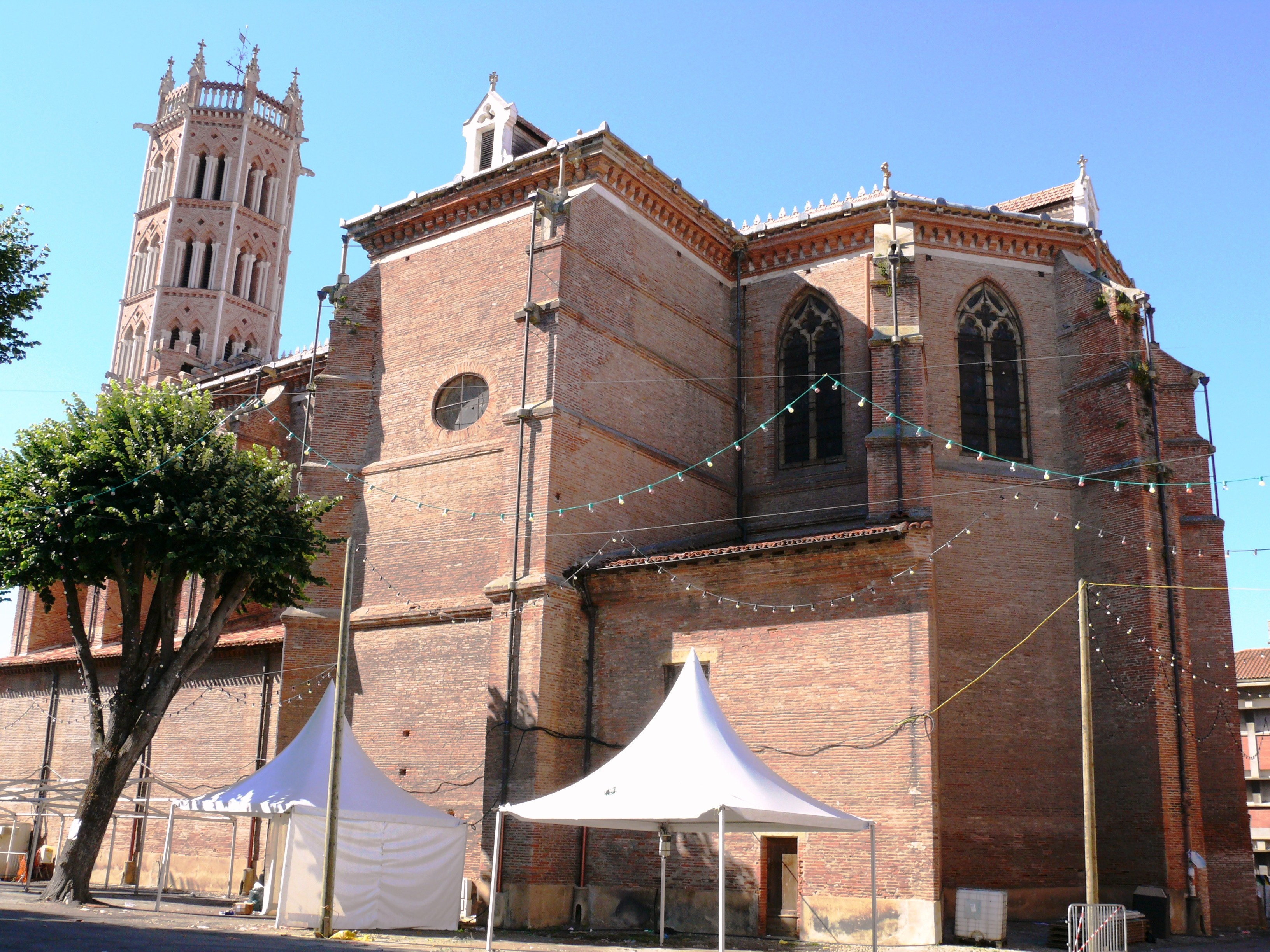 Pamiers (Ariège, France) - Cathédrale Saint-Antonin - Vue du chevet.